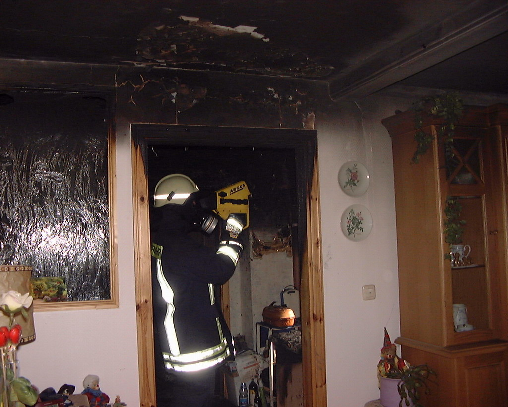 Wärmebildkamera - Suche nach Glutnestern